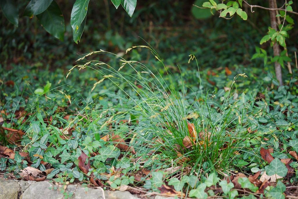 Carex_lenta_ナキリスゲ（カヤツリグサ科） 2012.10.14 和歌山県田辺市